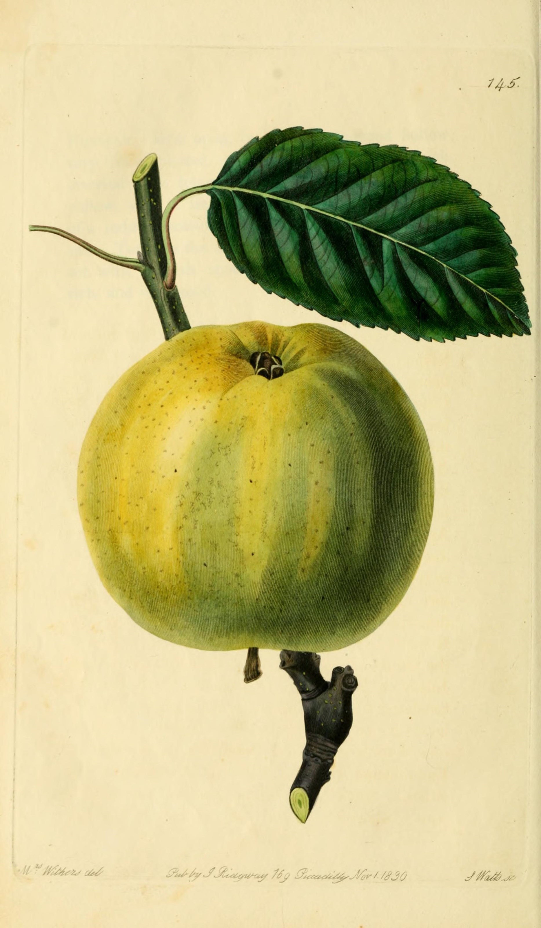 I ^^'/^.^^i^ i,^ S/i*A/yyj/toai^,ruM^ Uj ^iiZet^Ui^^J^v//S'JO